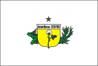 Bandeira de Antônio Martins, Rio Grande do Norte, Brasil.